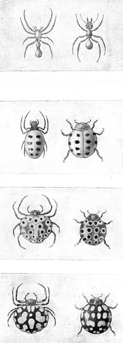 voorbeelden van mimicry uit "De Wonderen van het Heelal" Leiden 1930, Sijthoff pers.